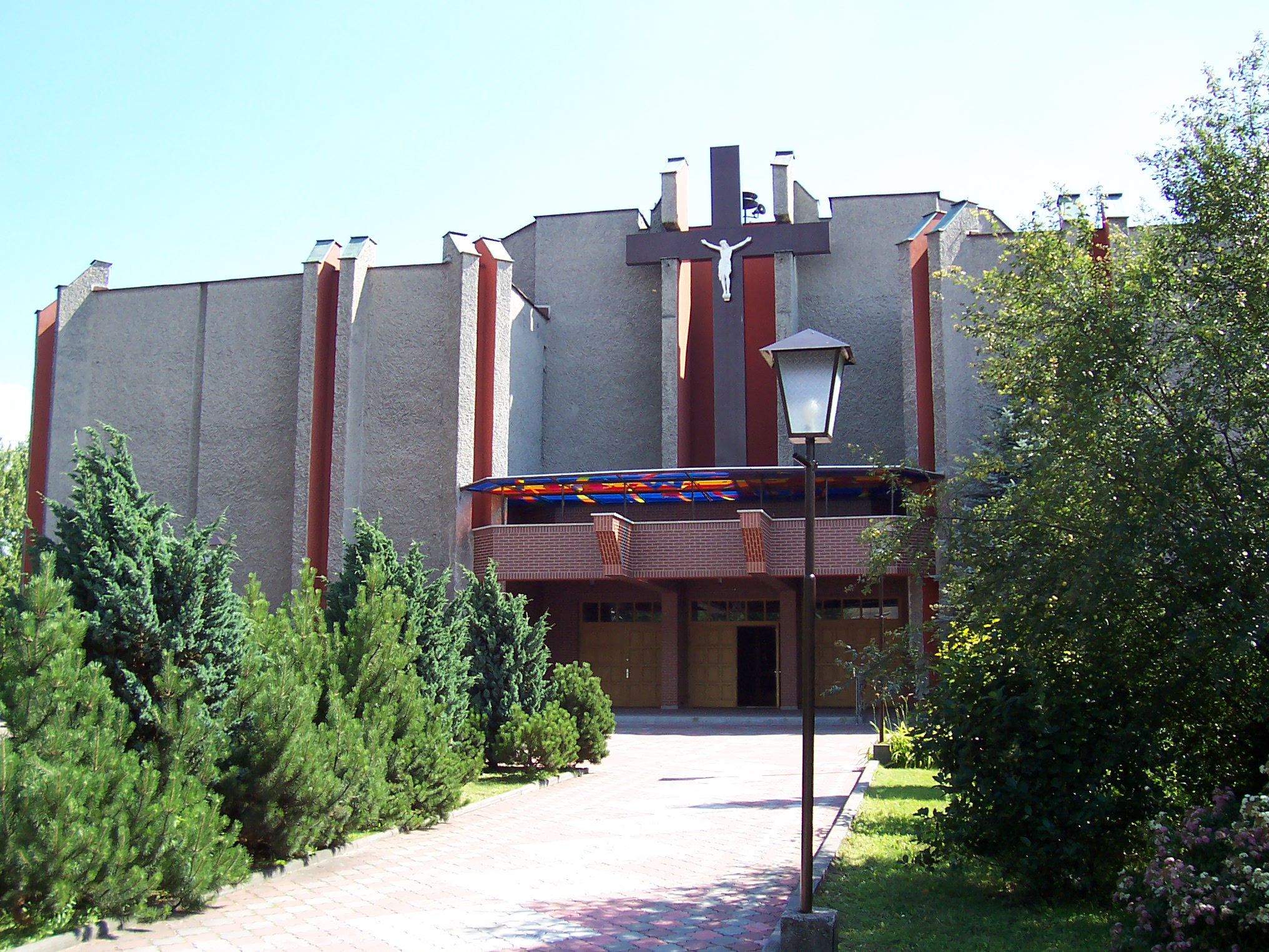 Kościół pw Matki Boskiej Częstochowskiej w Gliwicach